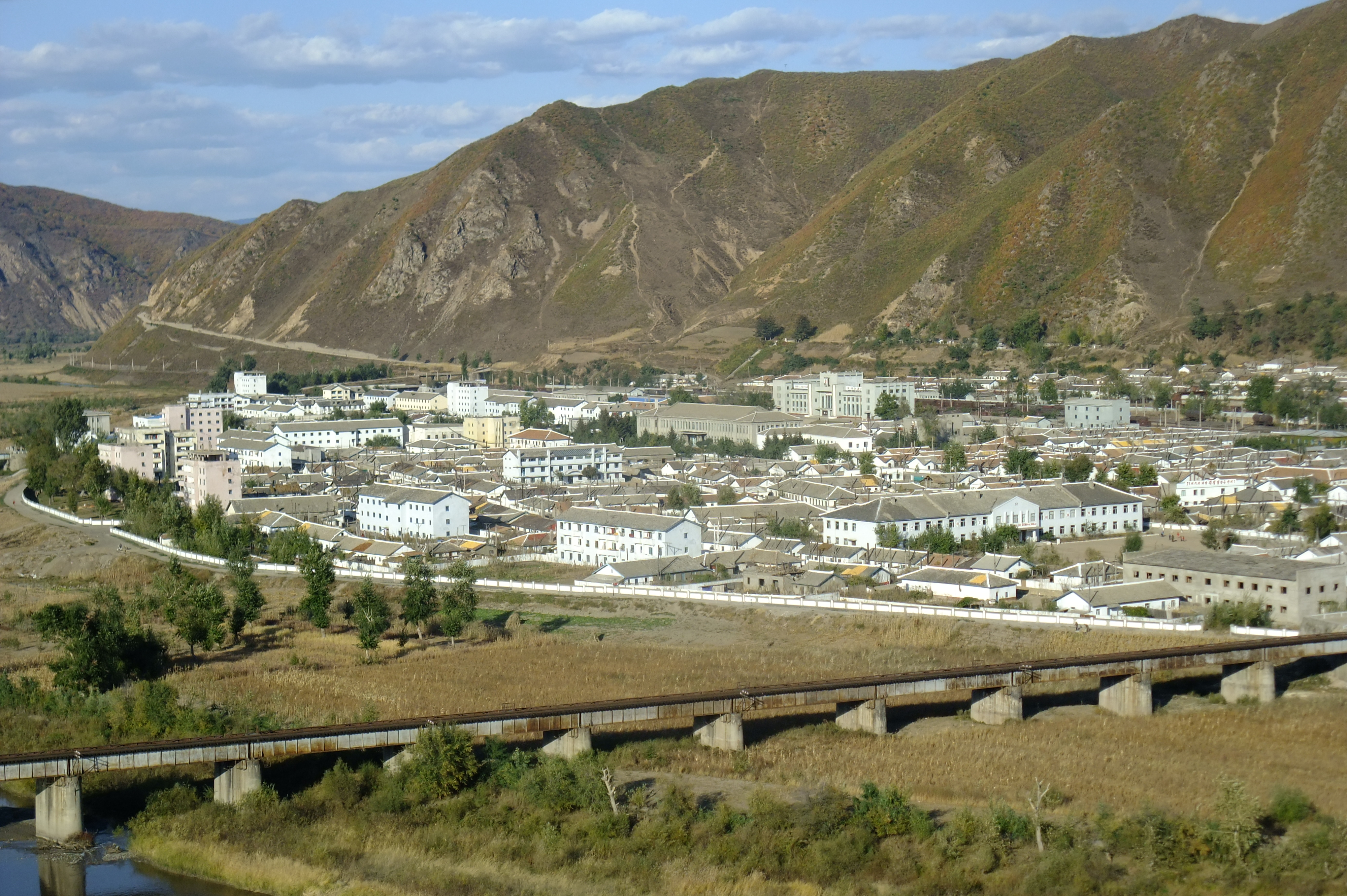 2011年10月俯瞰朝鲜南阳